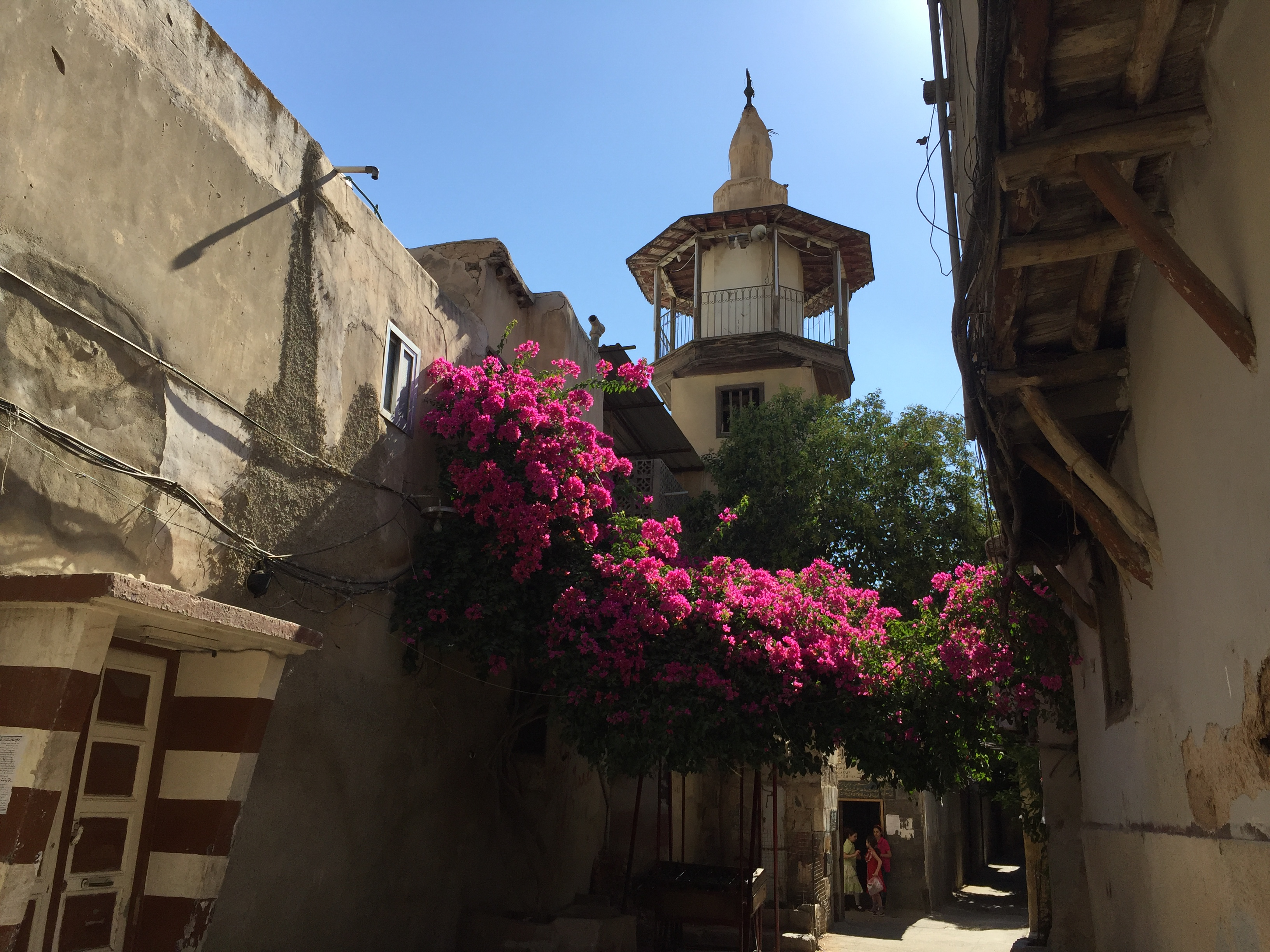 يظهر في عمق الصورة مئذنة مسجد الجرن الأسود وهو مسجد صغير في دمشق القديمة، وقد أعيد تجديده على أيدٍ خيرية ذُكرتْ أسماؤهم على لوحة رخامية وضعت على واجهة المسجد.